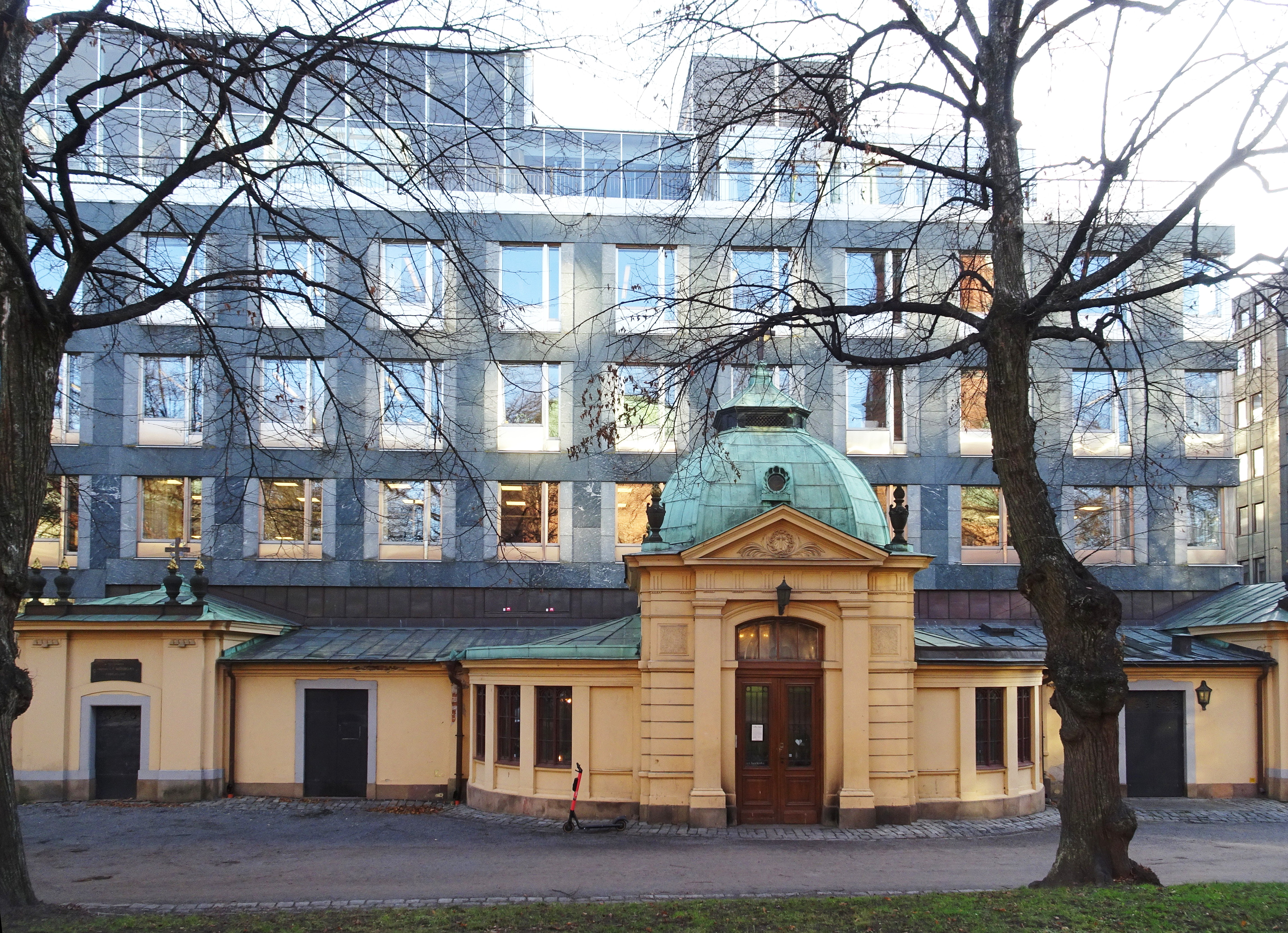 Klara kyrkas gravkor från 1889 ritat av Gustaf Dahl med fastigheten Svalan 9, byggår 1991–1994, arkitekt Åke Bejne, Tengbom arkitekter